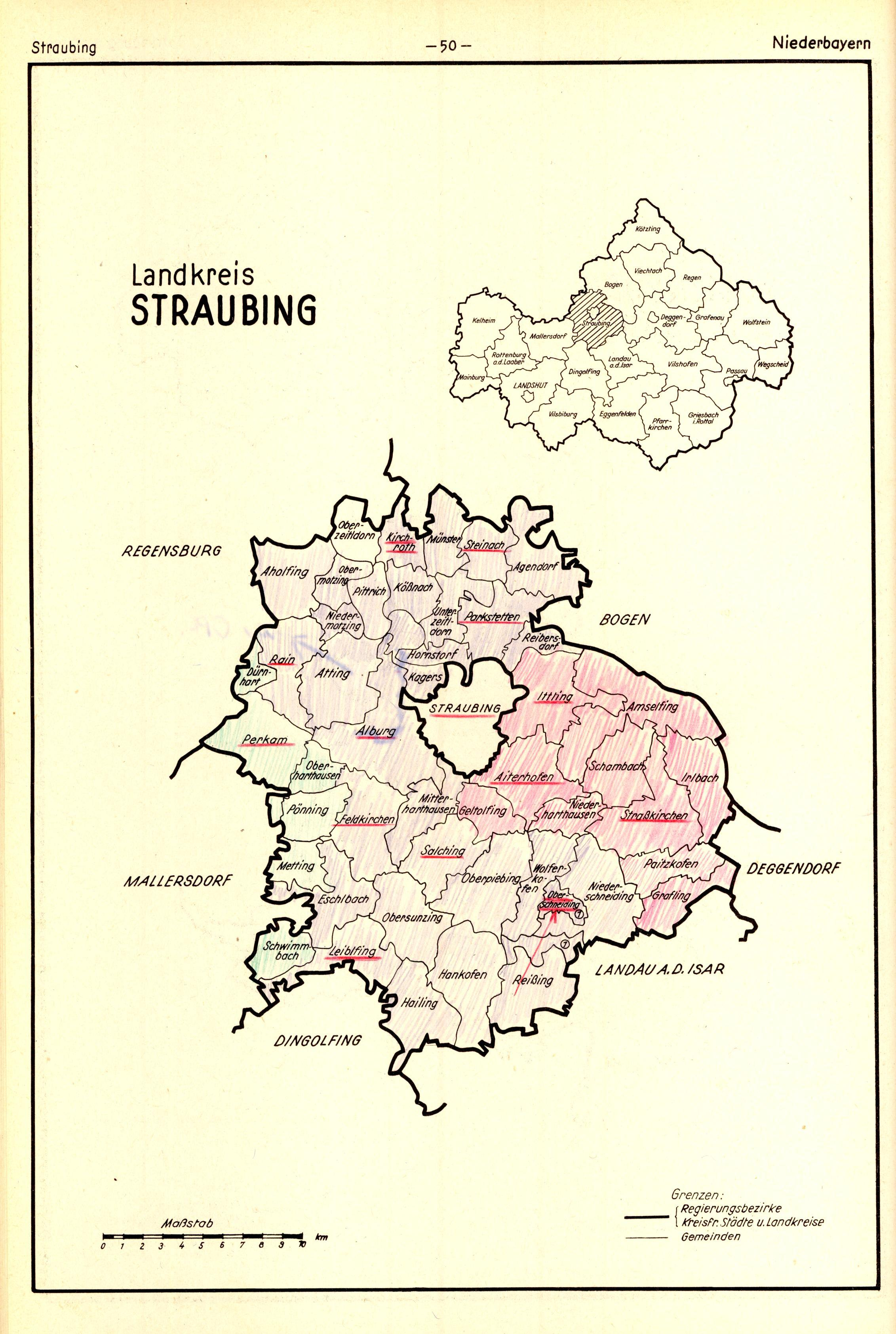 Landkreis Straubing Gemeindegrenzkarte zur Volkszählung am 6. Juni 1961, veröffentlicht im Mai 1963